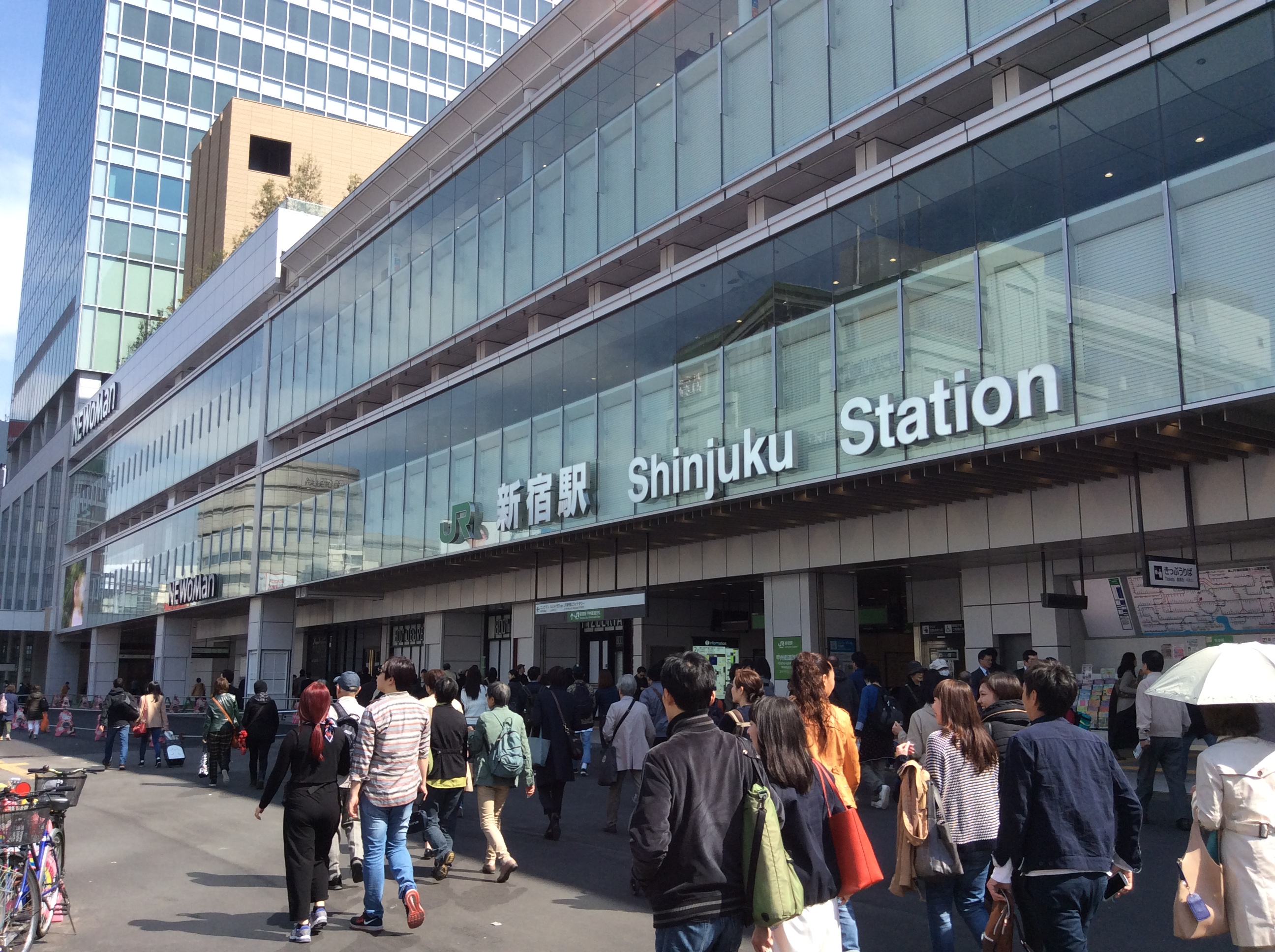 JR 新宿ミライナタワー